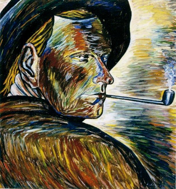 Vilho Lammen omakuva.